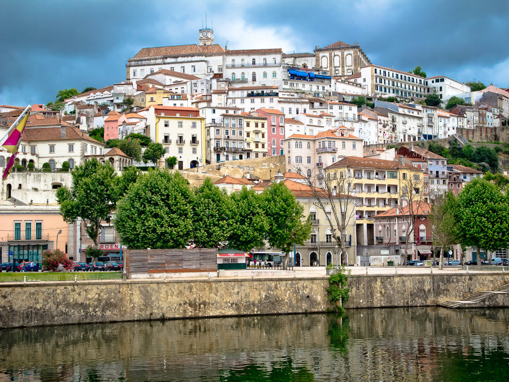 Portugal